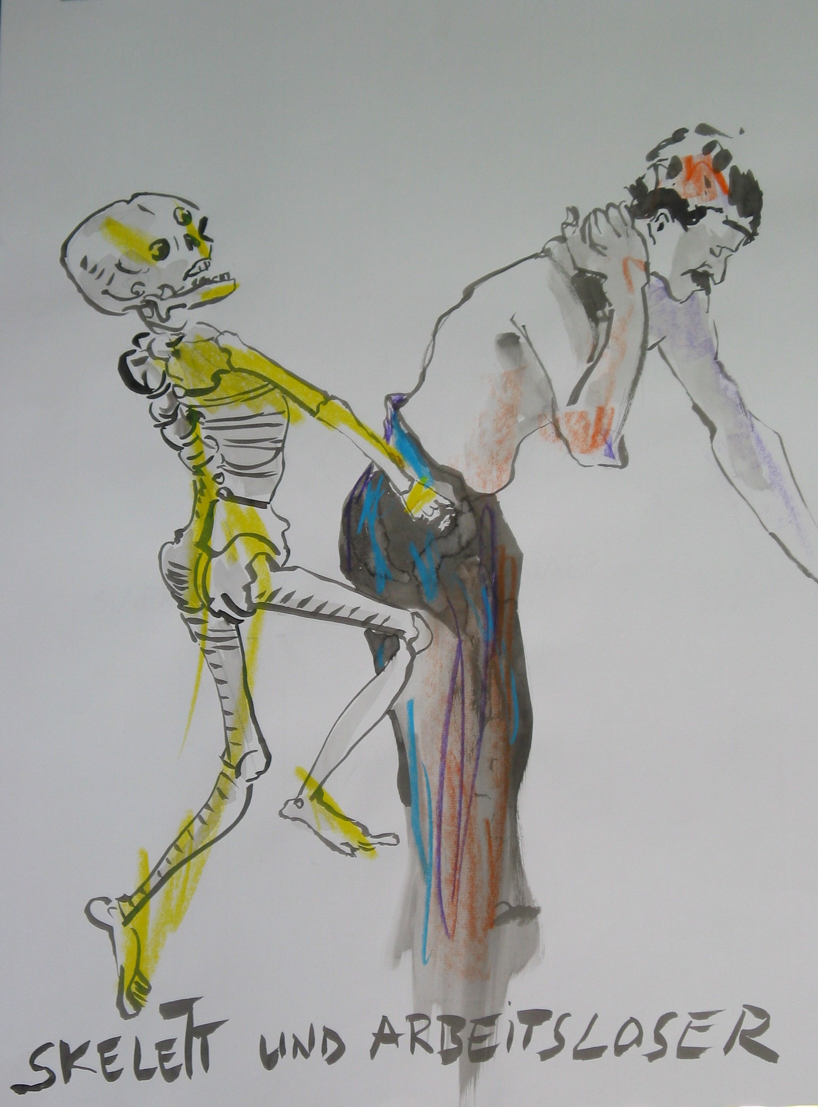 "Skelett und Arbeitsloser", 70 x 50 cm, Mischtechnik auf Papier